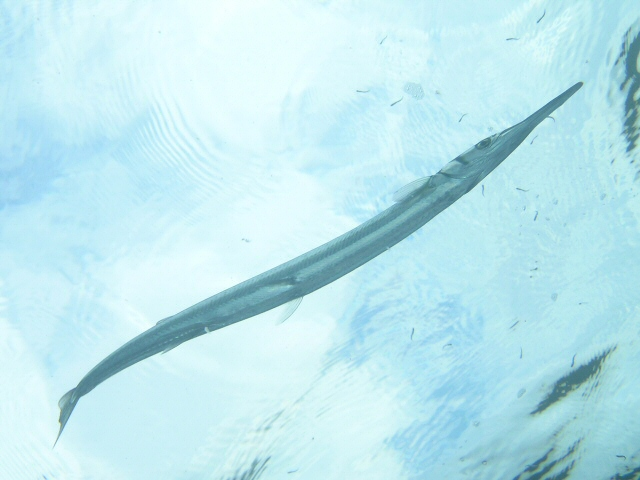 オキザヨリ Tylosurus crocodilus